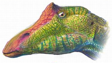 Ouranosaurus head.